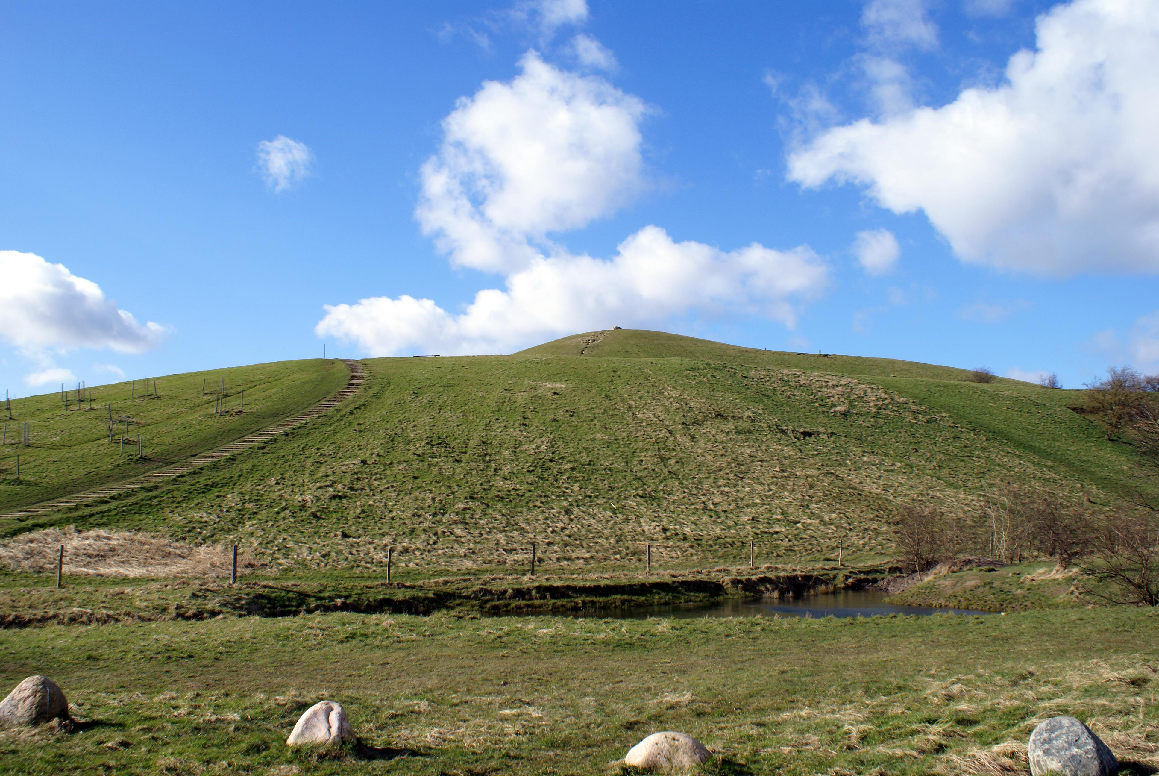 Herstedhøje